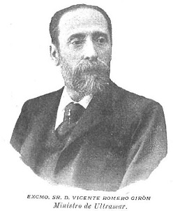 Retrato de Vicente Romero Girón, recogido en la revista española Nuevo Mundo.